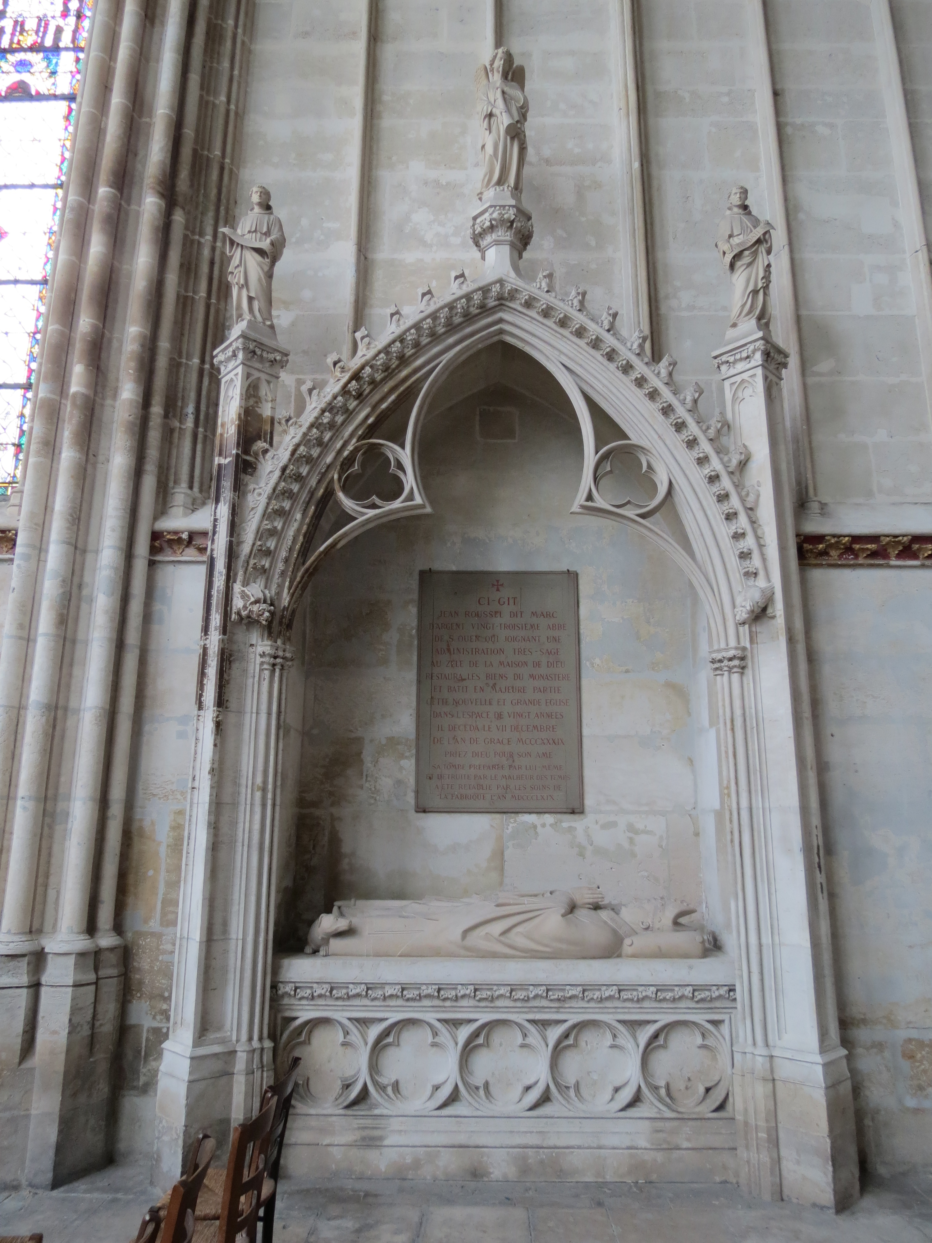 Enfeu et gisant de Jean Roussel dit Marc-d'Argent, contre le mur sud de la chapelle axiale de la Vierge.